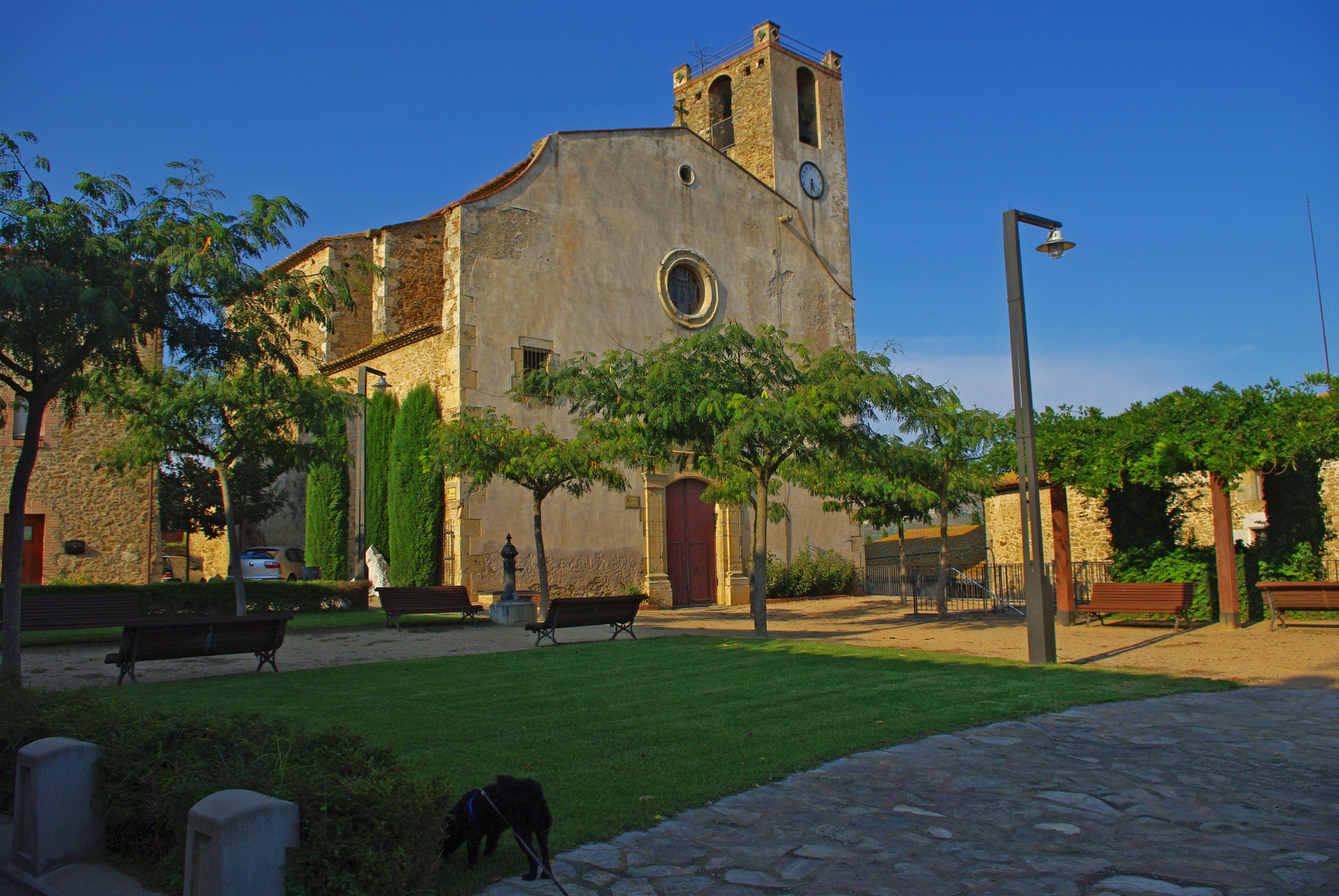 Església de Santa Maria de Gualta